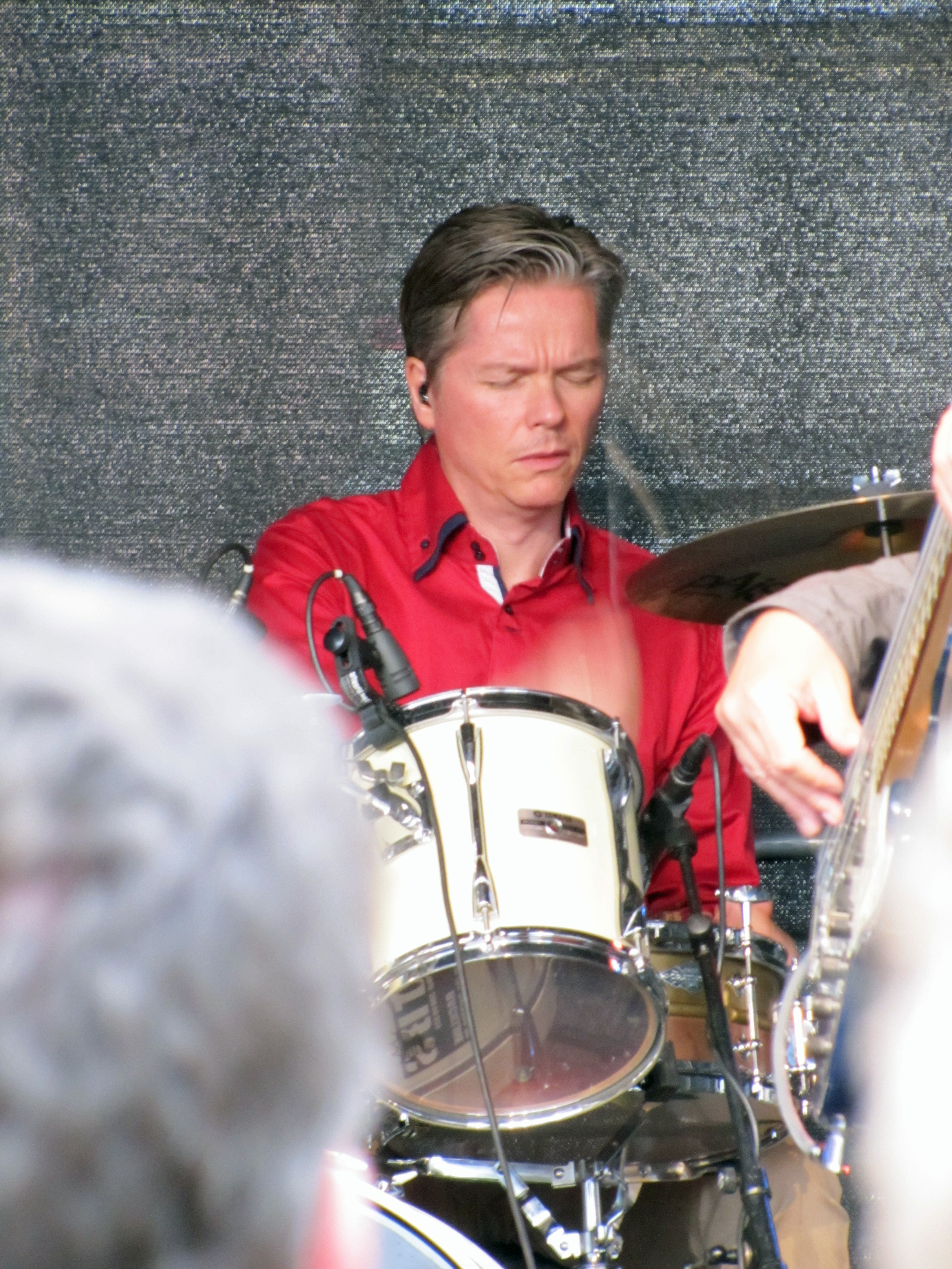 Gulli Briem (Schlagzeug) von Mezzoforte, 2012 bei Jazz zum Dritten auf dem Römerberg in Ffm.